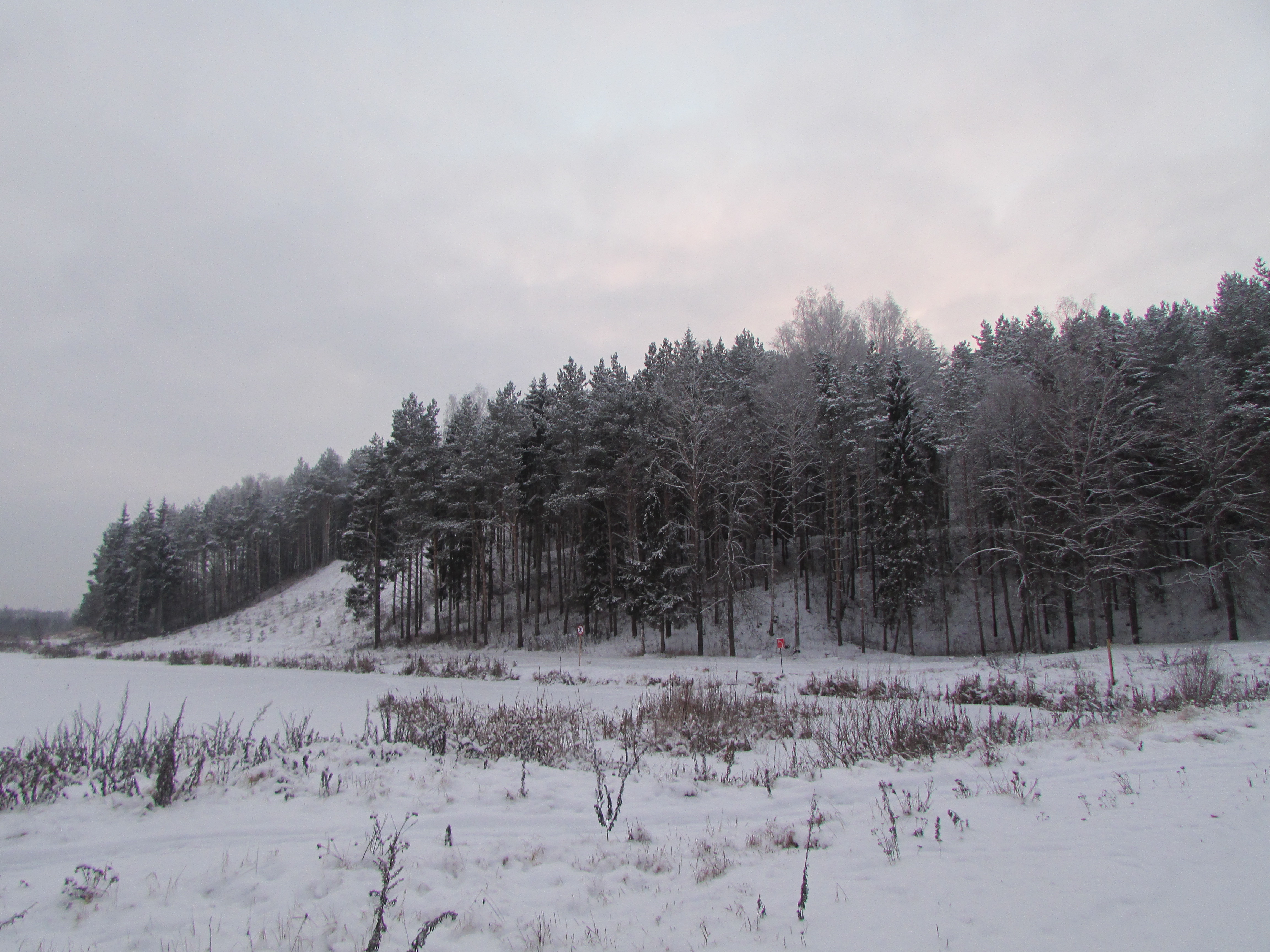 Городище Белый-I (Верхний город): территория, ограниченная левым берегом р.Обша, устьем и левым берегом речки Веселка, оз.Бездонное, территория городского парка, Белый, Бельский район, Тверская область